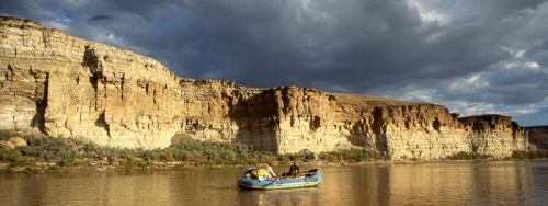 Desolation Canyon, Utah.